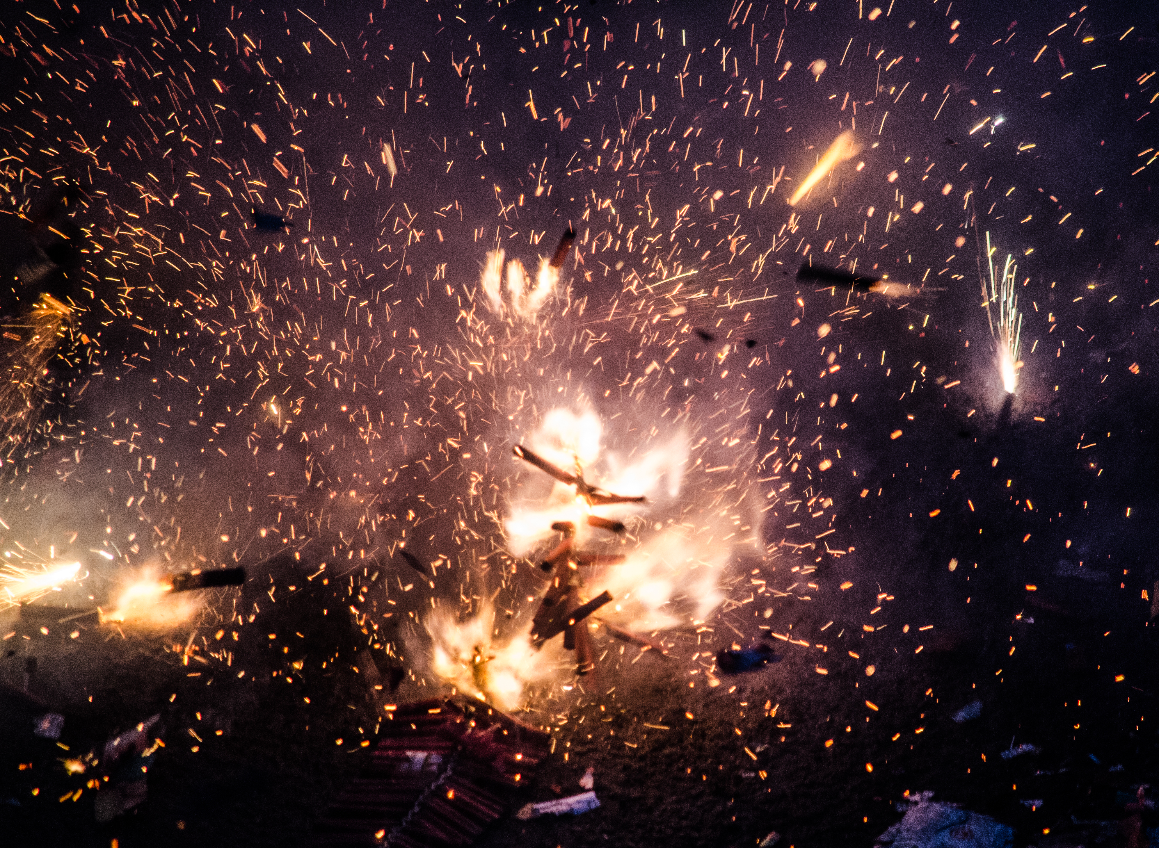 Saram